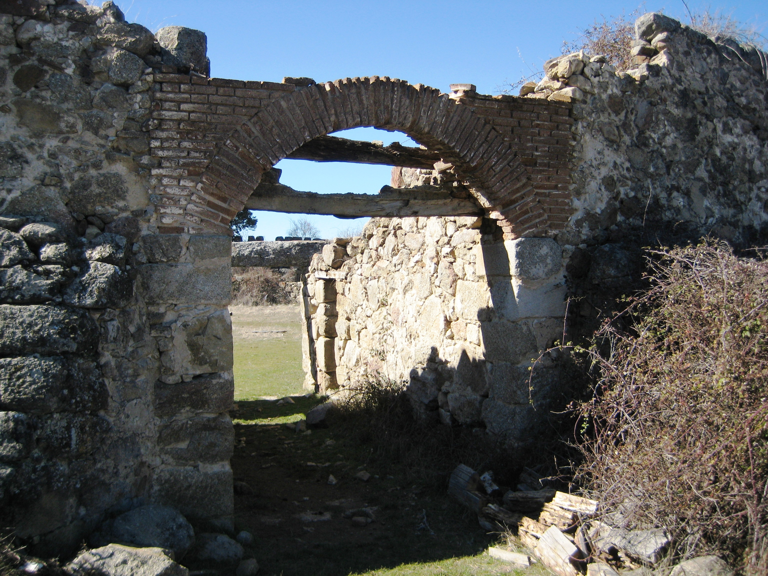 PUERTA GRANDE DE LA PLAZA DE TOROS DE VILLAFRANCA DE LA SIERRA (AVILA, ESPAÑA)